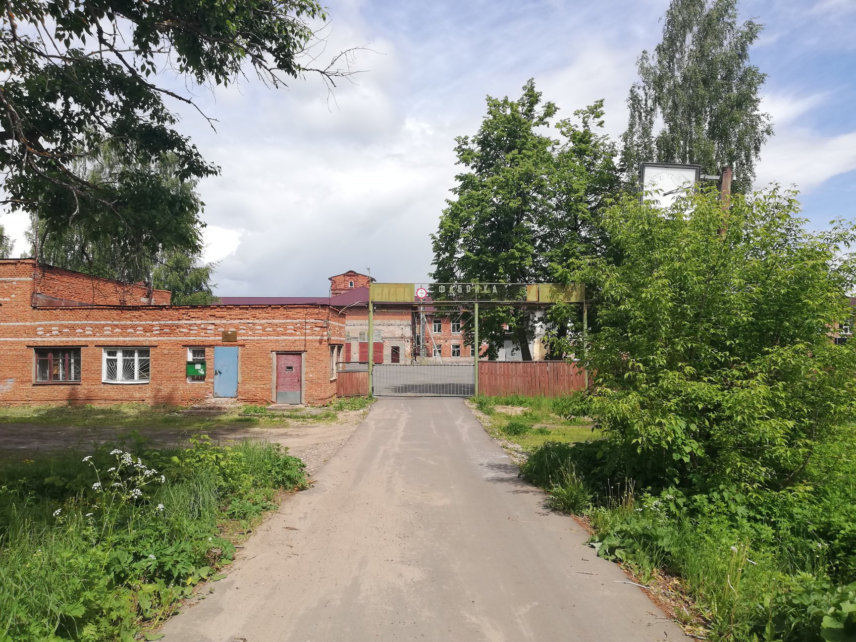 Фабрика Абрамова